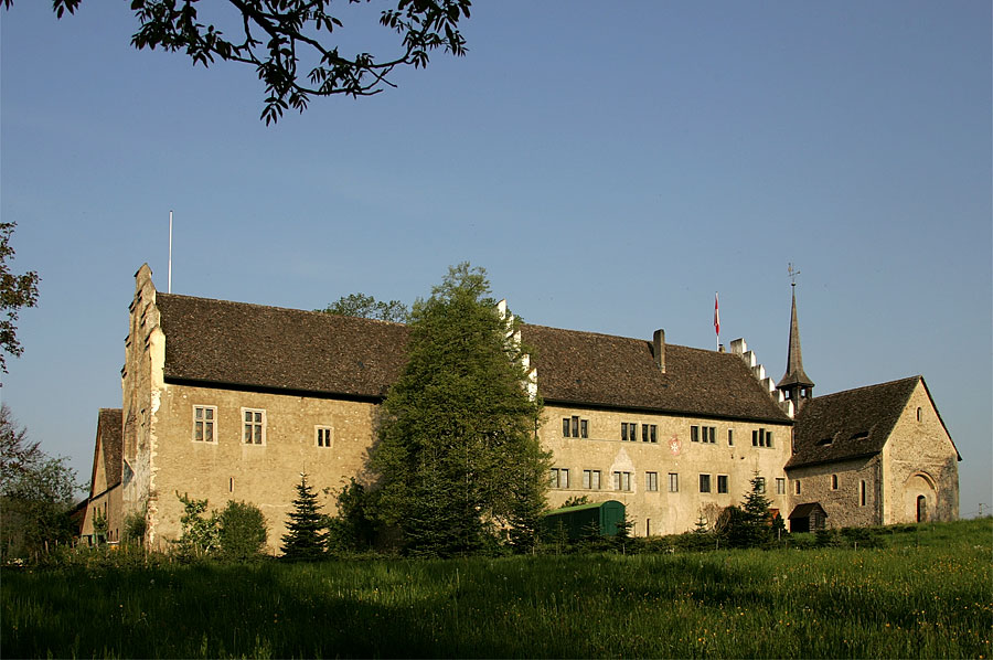 Ritterhaus in Bubikon, von Osten her gesehen